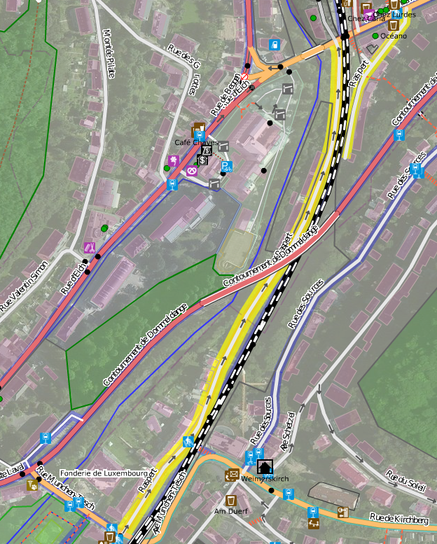 De Raspert zu Weimeschkierch / Dummeldeng